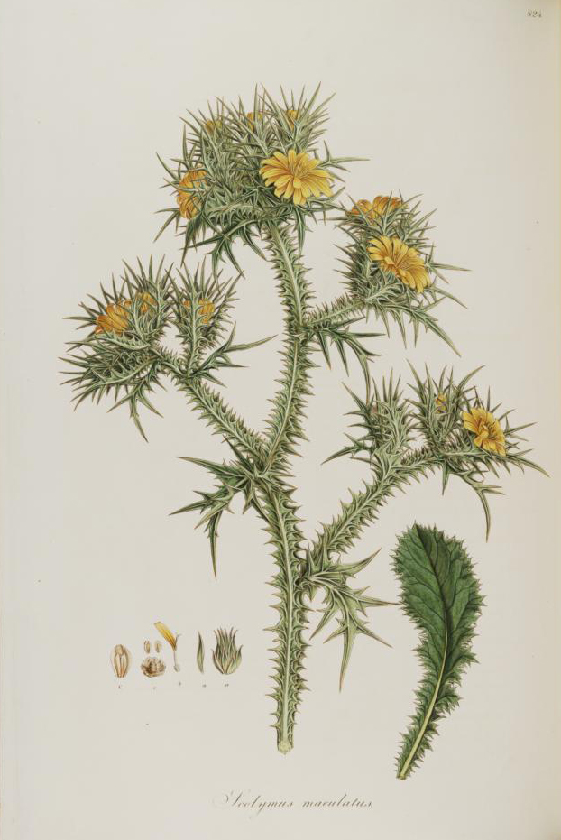 Legende: a Fruchtende Hülle, Hüllblatt (x1). b Zungenblüte (x1). c Körbchenboden mit Früchten, Früchte mit Spreublättern (x1). C Frucht mit Spreublatt (vergr.).